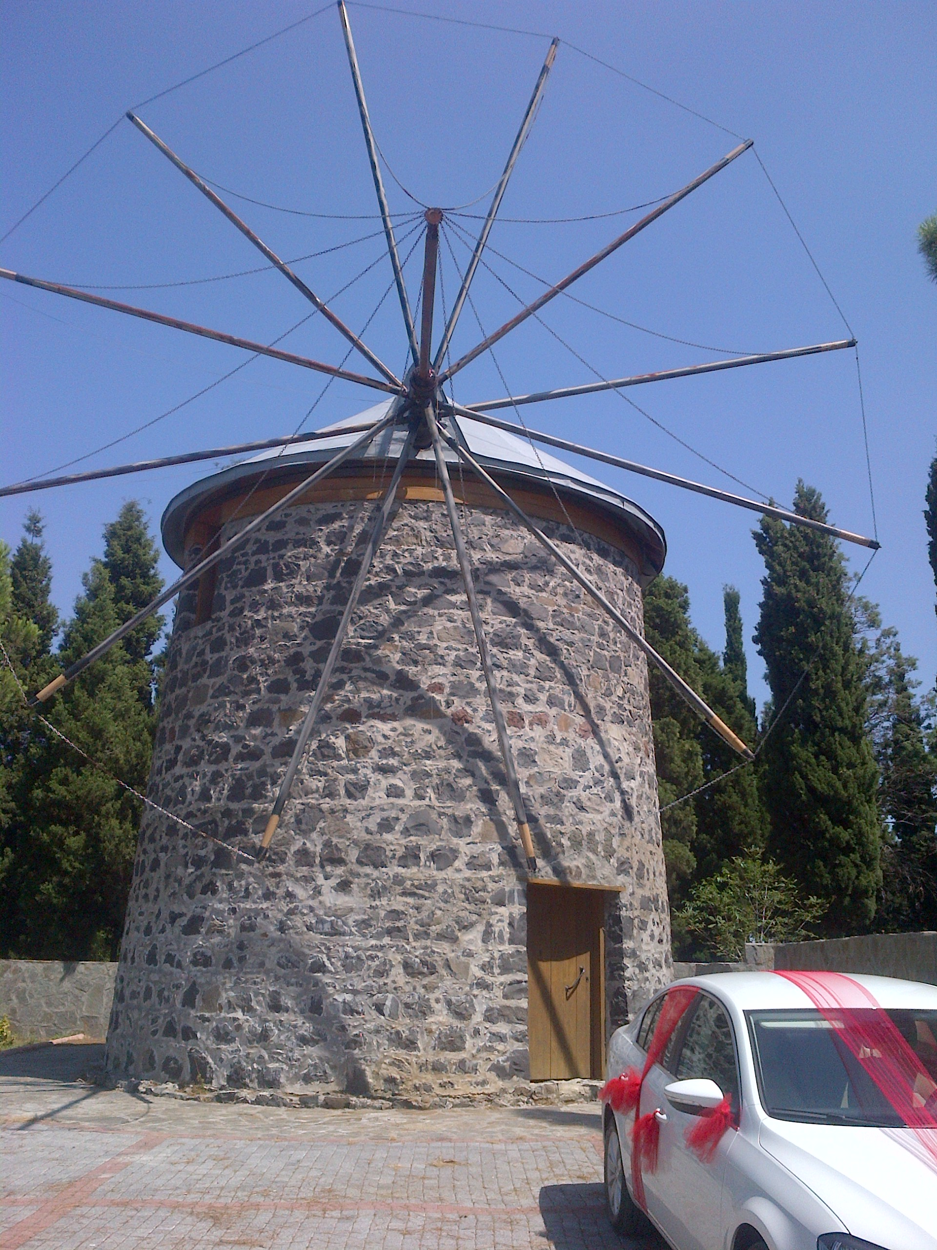 Türkiye'de evlenecek çiftlerin düğün öncesi uğur için ziyaret ettiği eski bir yeldeğirmeni.